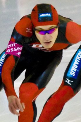 Team Japan Team Pursuit. Hiroki Hirako, Shigeyuki Dejima, Teruhiro Sugimori